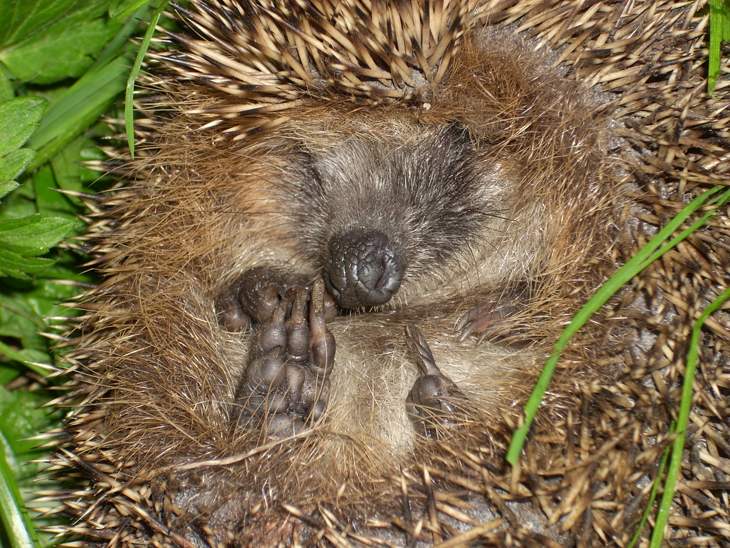 Erinaceus Europaeus - fullface